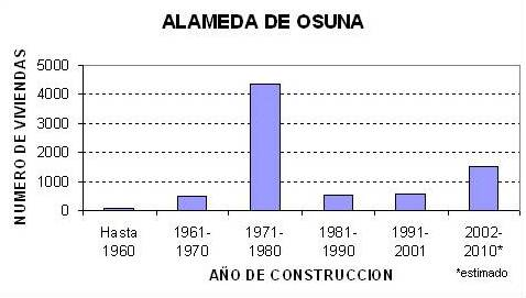 Distribución del número de vivendas contruidas en la Alameda por año